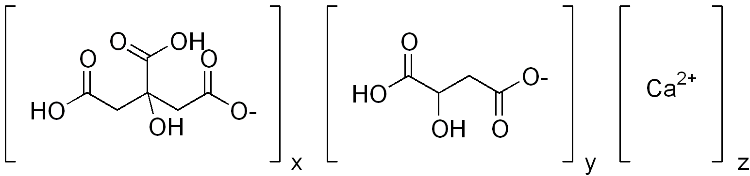 chemical structure of calcium citrate malate